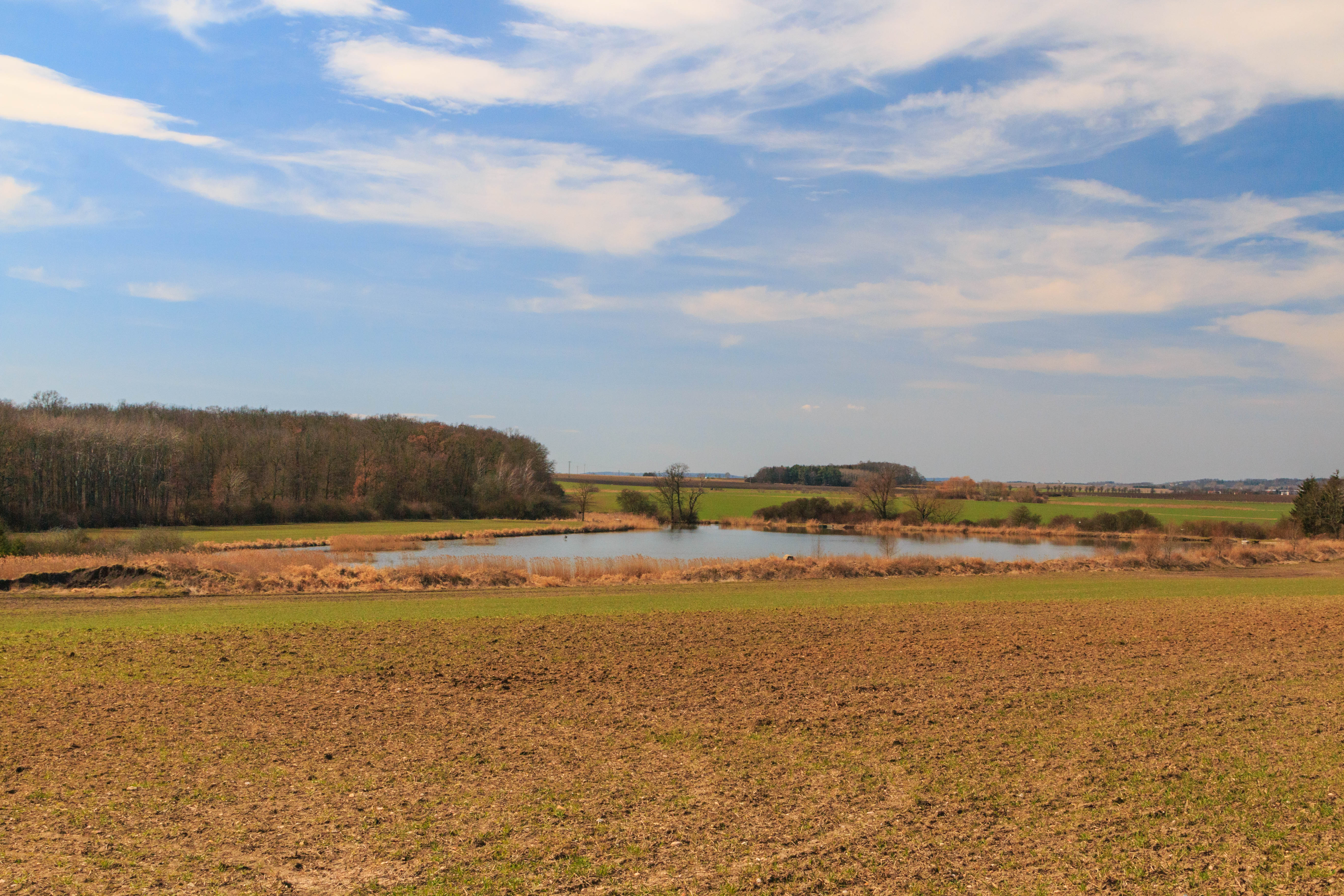 Starovodský rybník u obce Stará Voda v okrese Hradec Králové Project: Vodstvo.